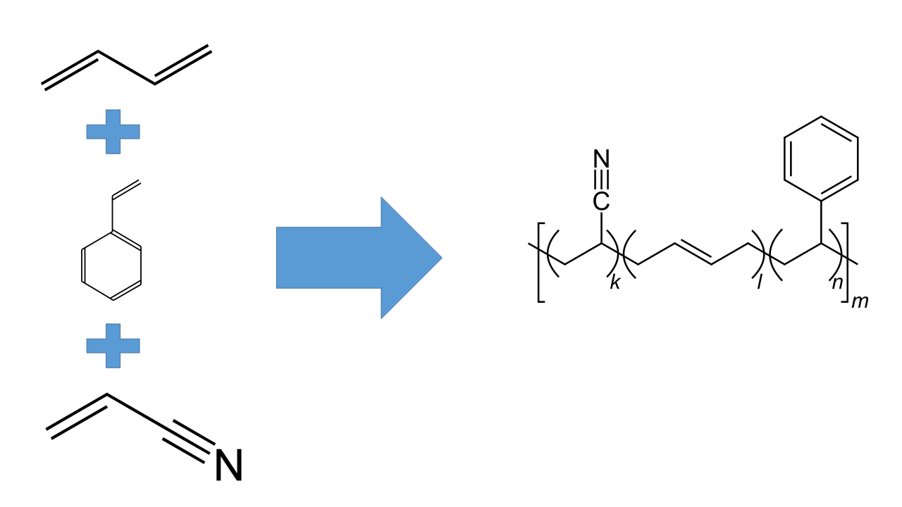 Sintese do copolimero ABS